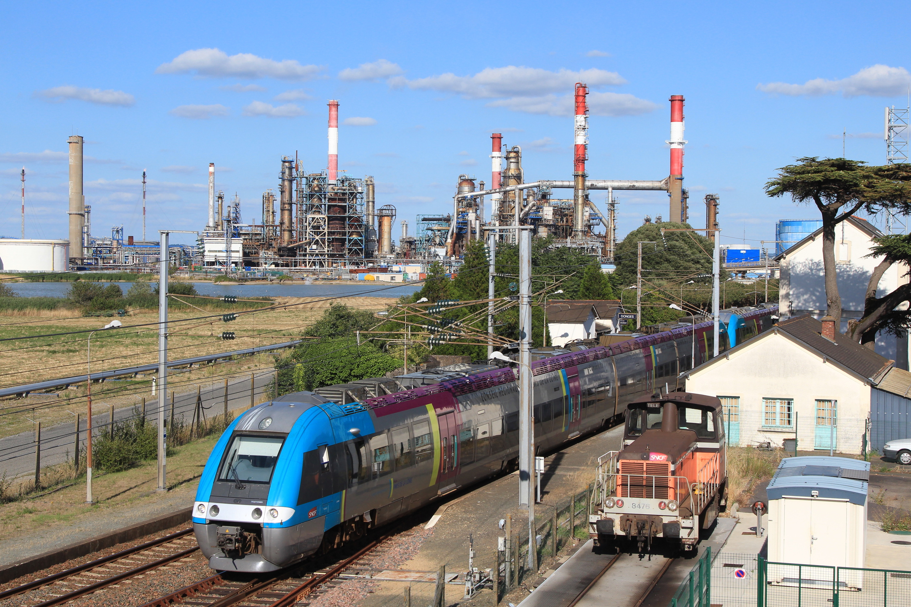 Deux ZGC repartent de Donges, à destination de Saint-Nazaire, par le TER 58041 parti de Nantes.